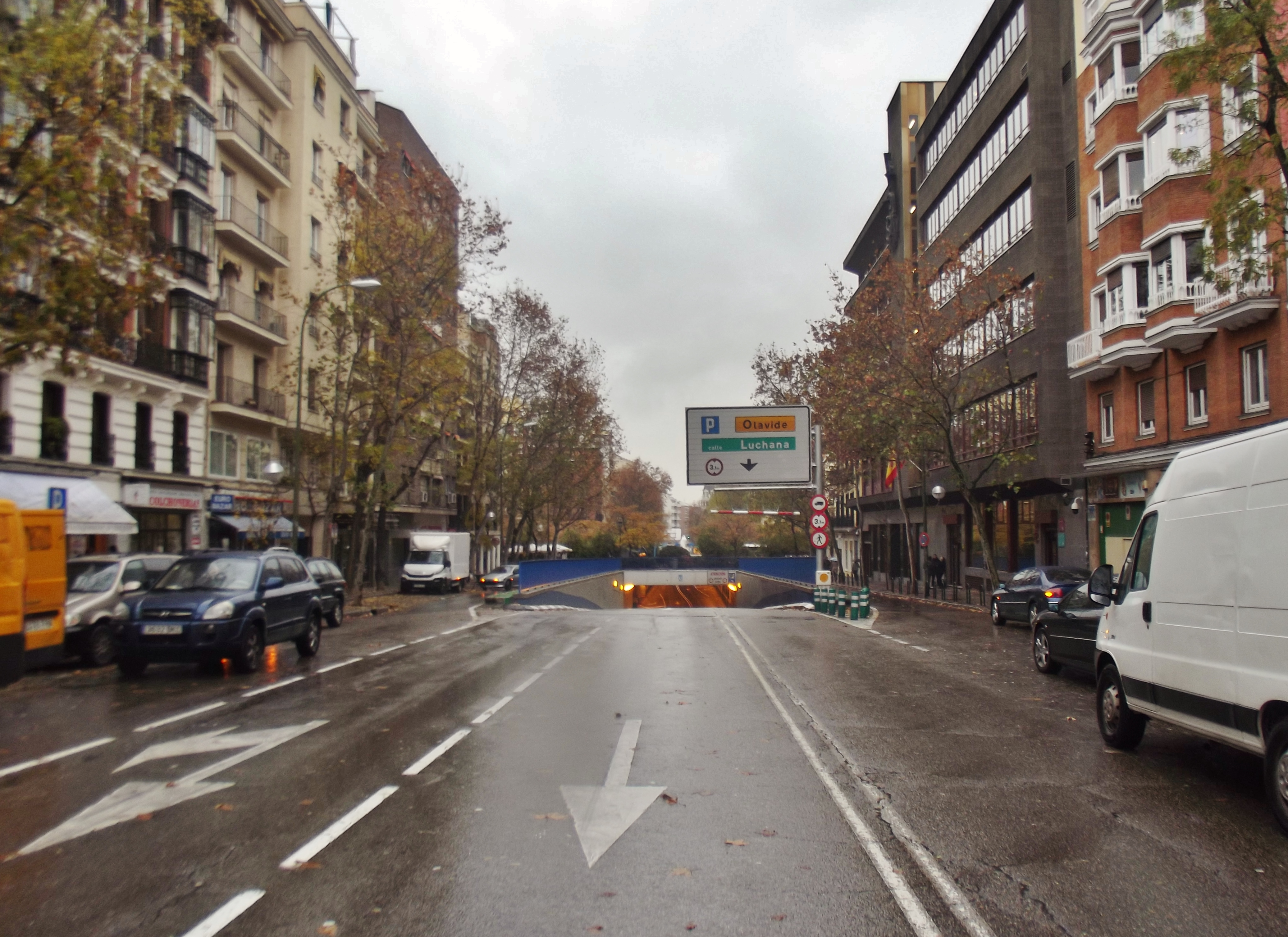 Calle de Trafalgar, Madrid